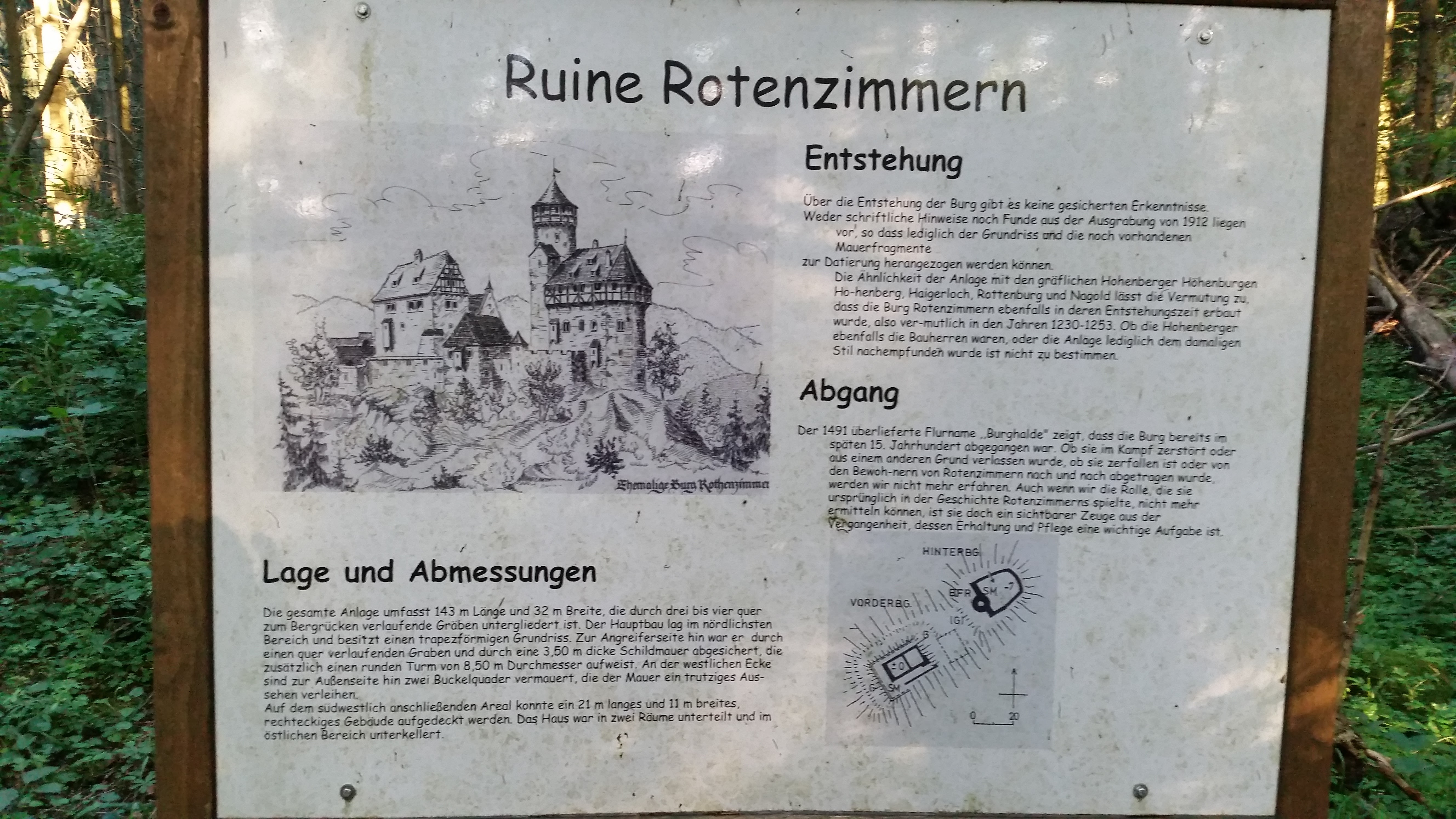 Infotafel, Burgruine Rotenzimmern, Dietingen